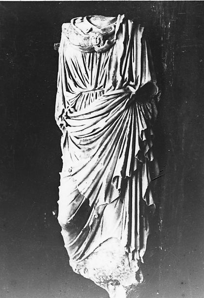 Reproduction d'une photographie d'une statuette d'Athéna Fouilles archéologiques d'Albert Lebègue de la Villa romaine de Chiragan à Martres-Tolosane (Haute-Garonne), 1890-1891 Plaque négative pour projection, format 8x9 cm. Photographie originale de Félix Régnault "Fouille de M Lebègue à Martres-Tolosane 1890-1891" La statuette est conservée au Musée Saint Raymond, n° inv Ra 113